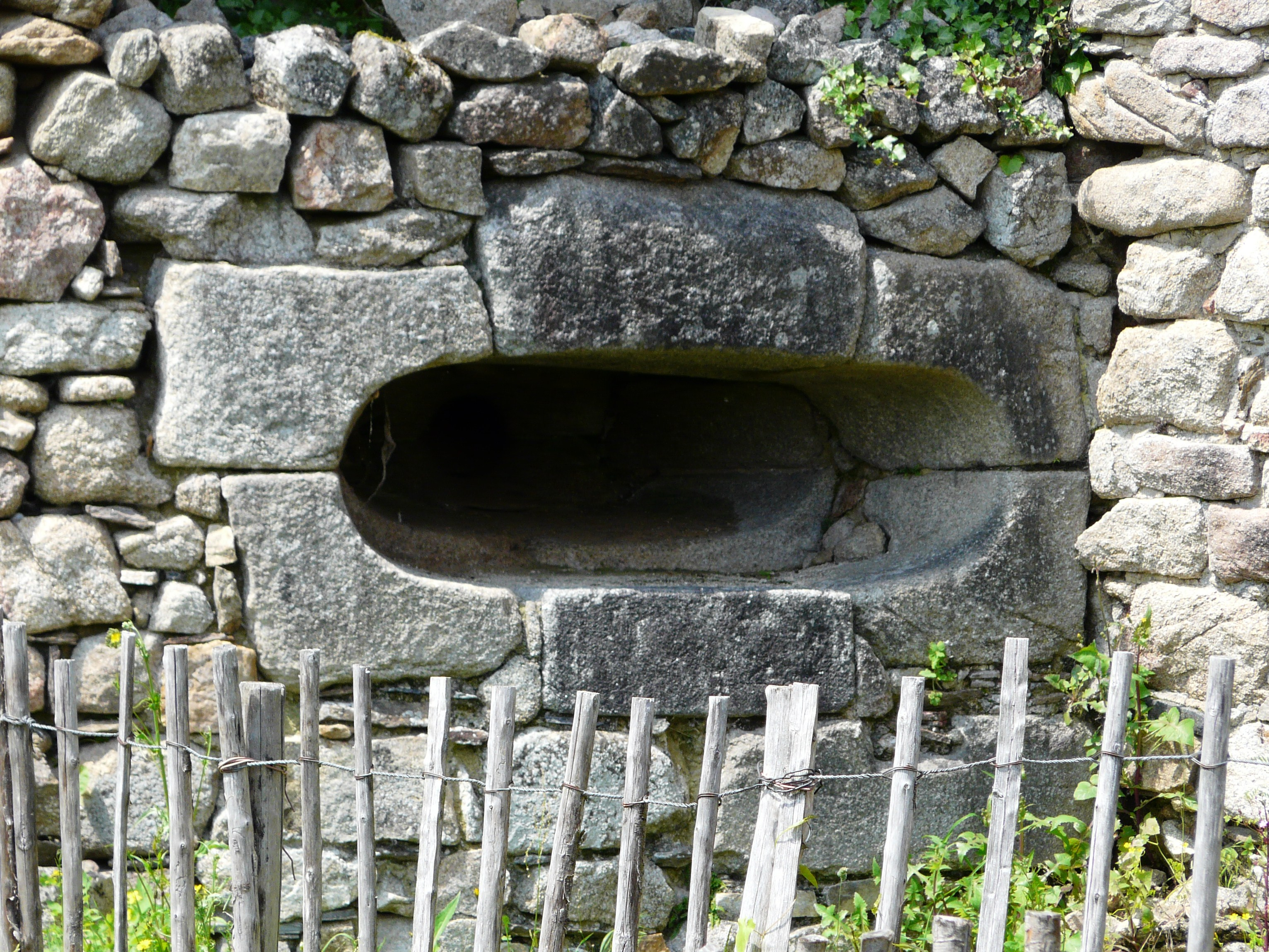 Élément défensif du château de Lastours, Rilhac-Lastours, Haute-Vienne, France.